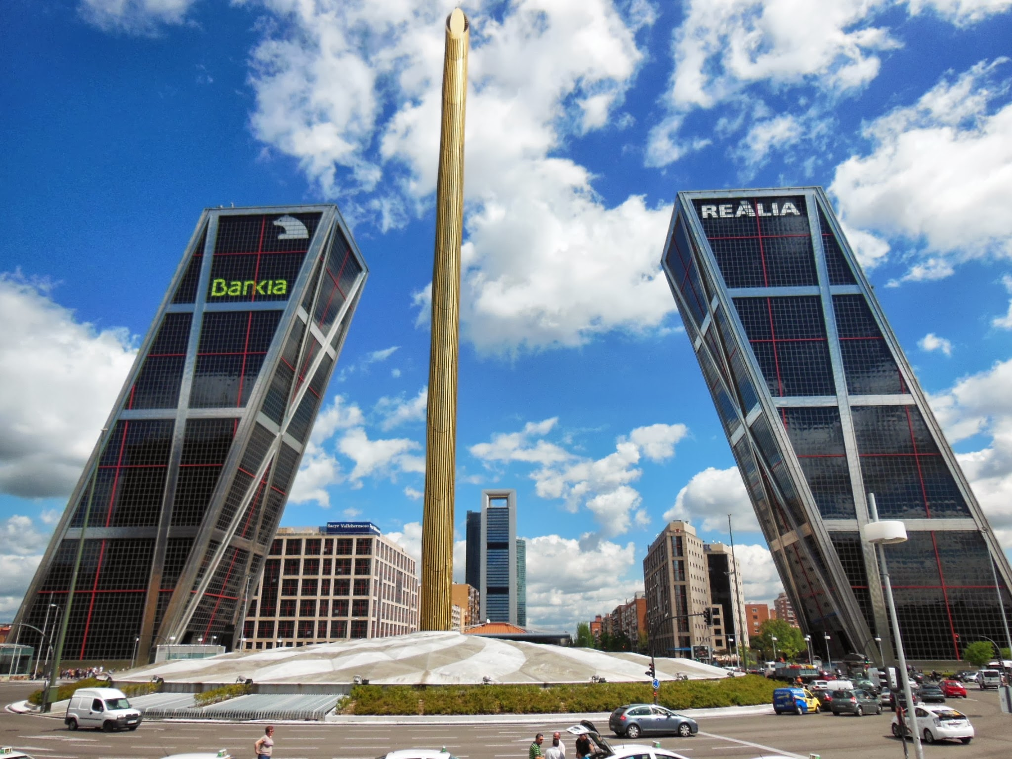 Plaza de Castilha